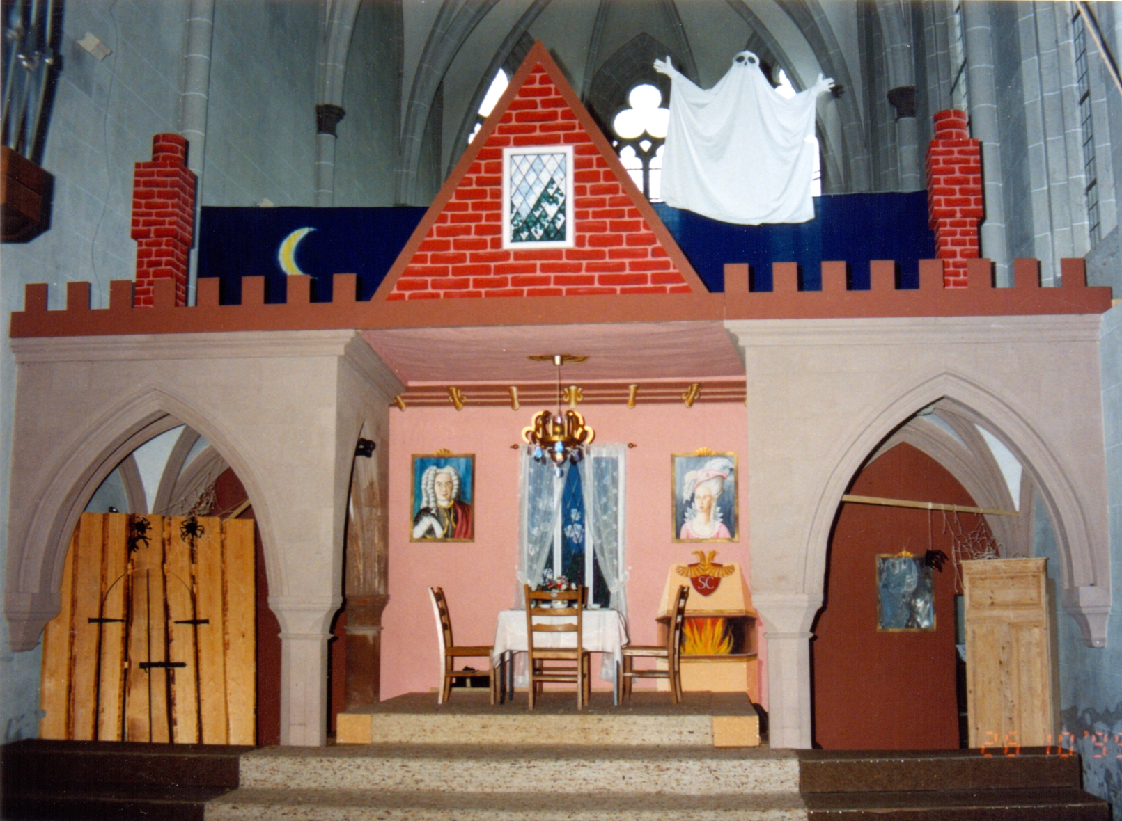 Kindermusical in der Marienkirche Höxter